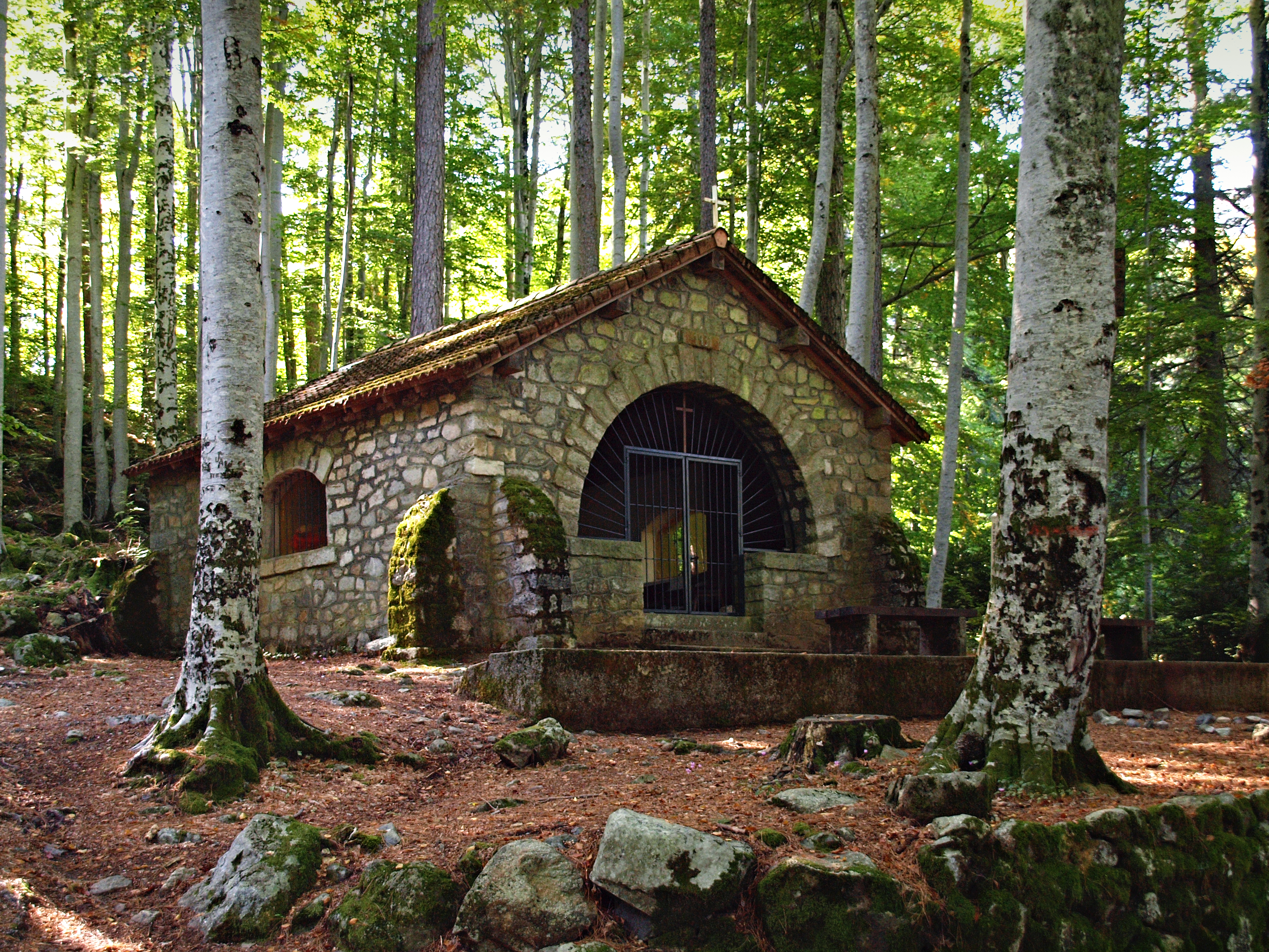 Vivario (Corsica) - Chapelle Notre-Dame de la Forêt à Vizzavona